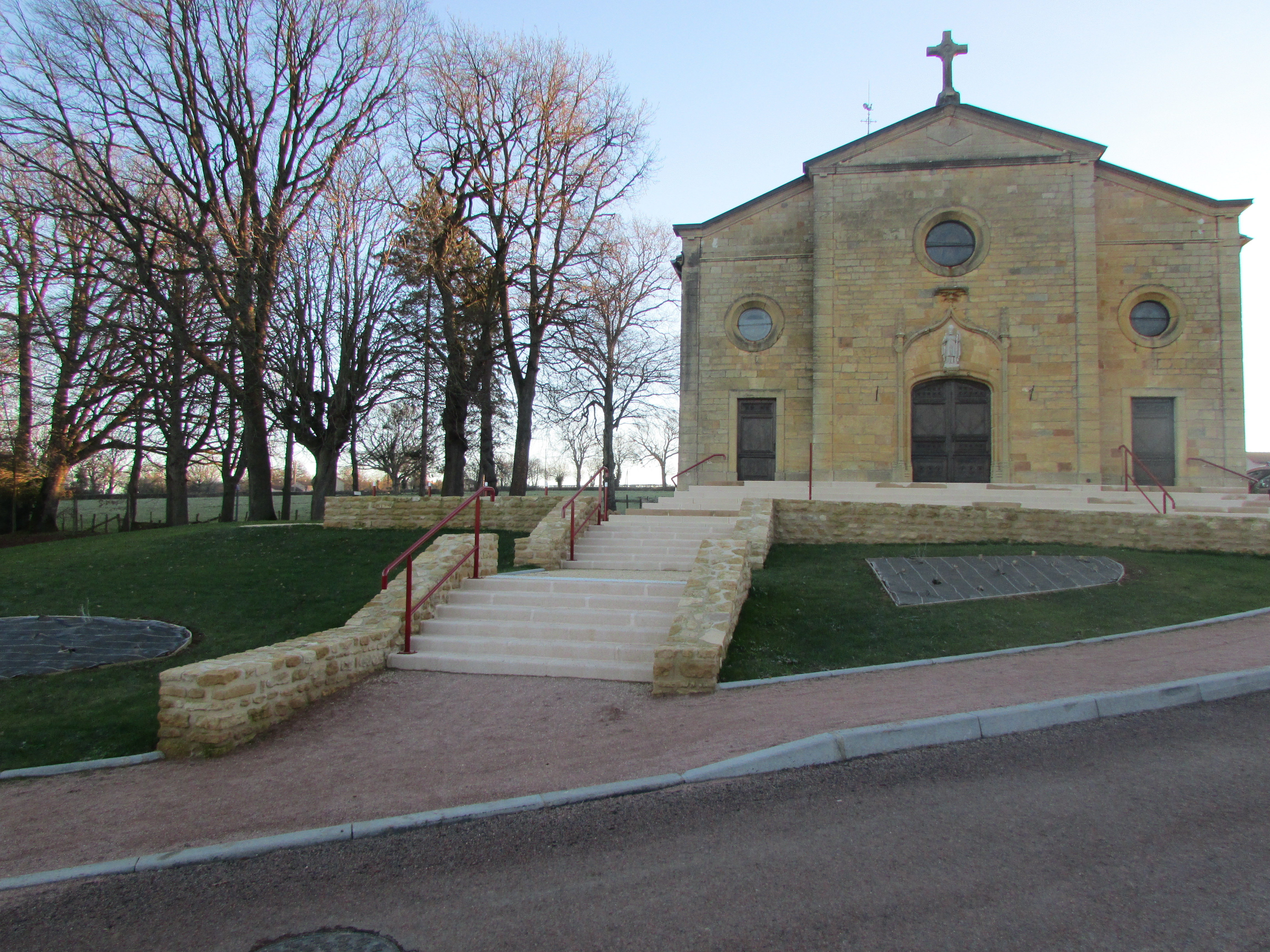 église de st hilaire sous charlieu